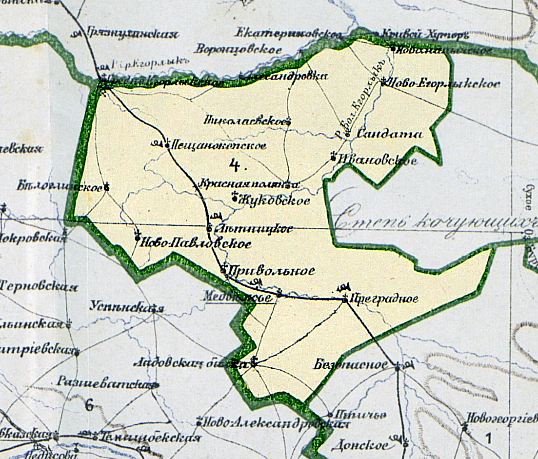 Карта Медвеженского Уезда Ставропольской Губернии по состоянию на 1878г.